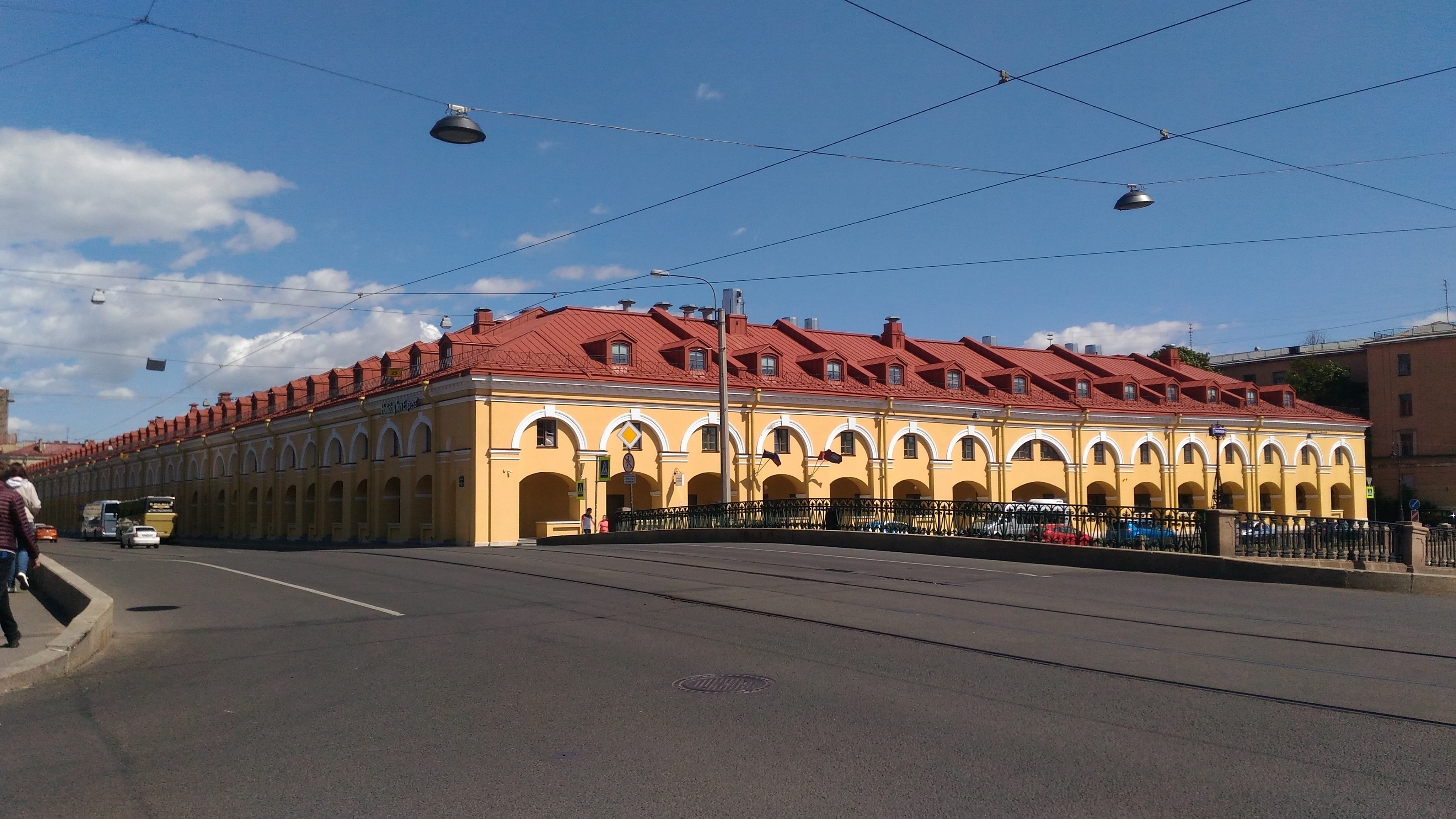 Здание Никольских рядов через год после реставрации